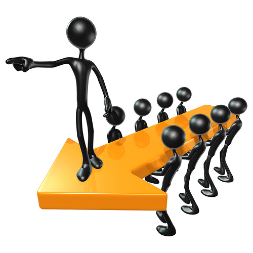 Equipe 3D objectif concept